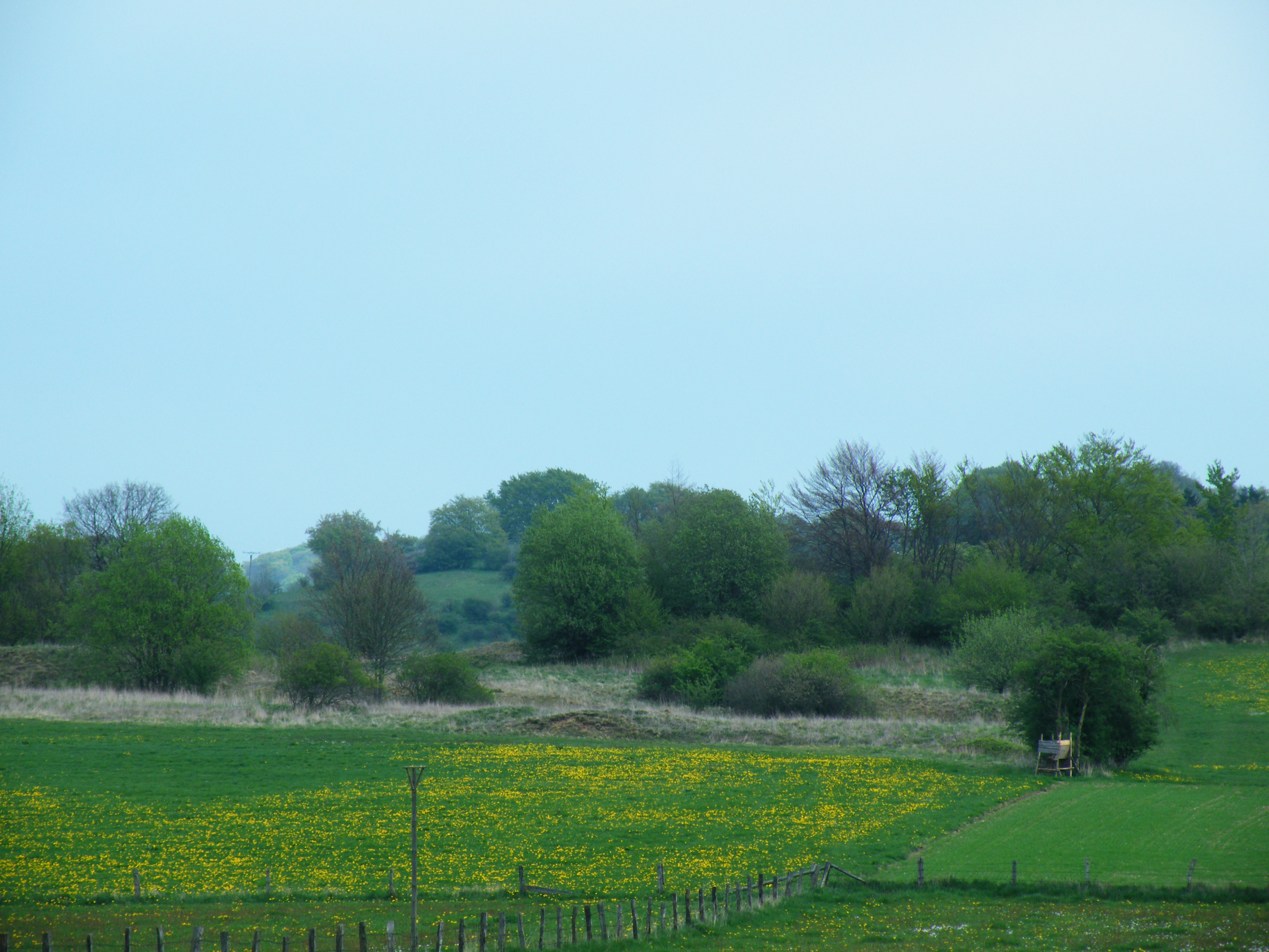 Naturschutzgebiet Frettholz südliche Teil, dahinter im Hintergrund teilweise Naturschutzgebiet Scheffelberg.